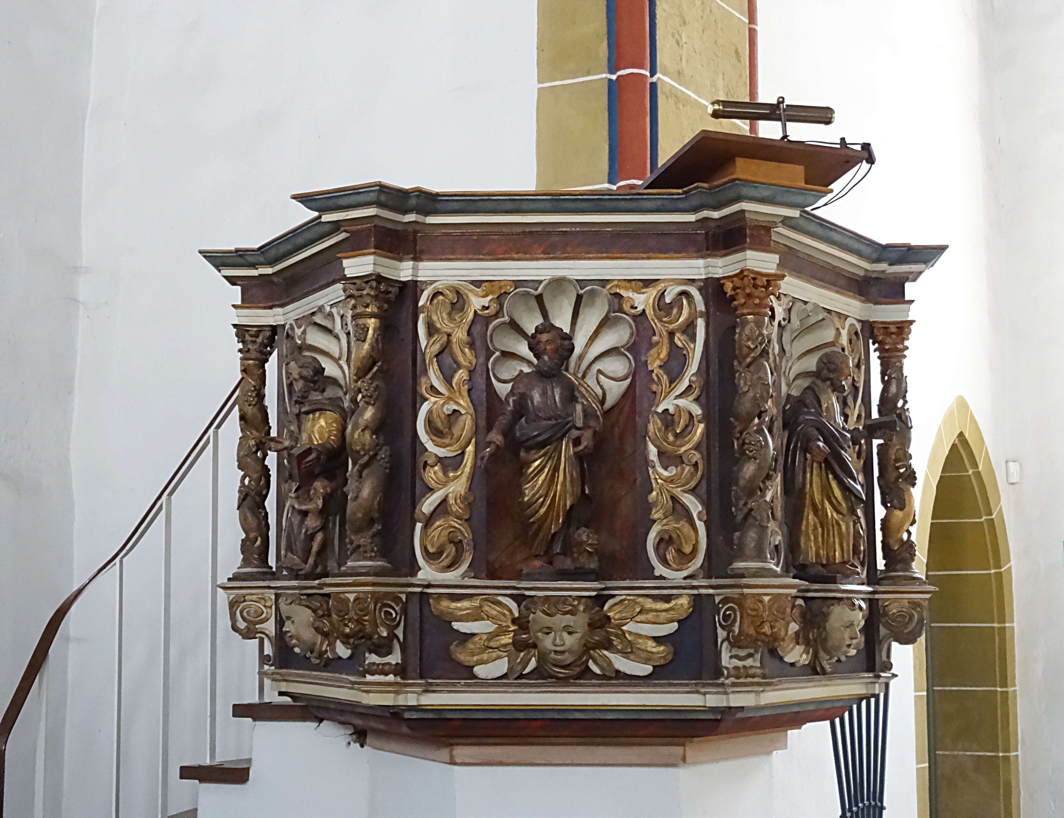 Kanzel von 1687 in der Reglerkirche Erfurt